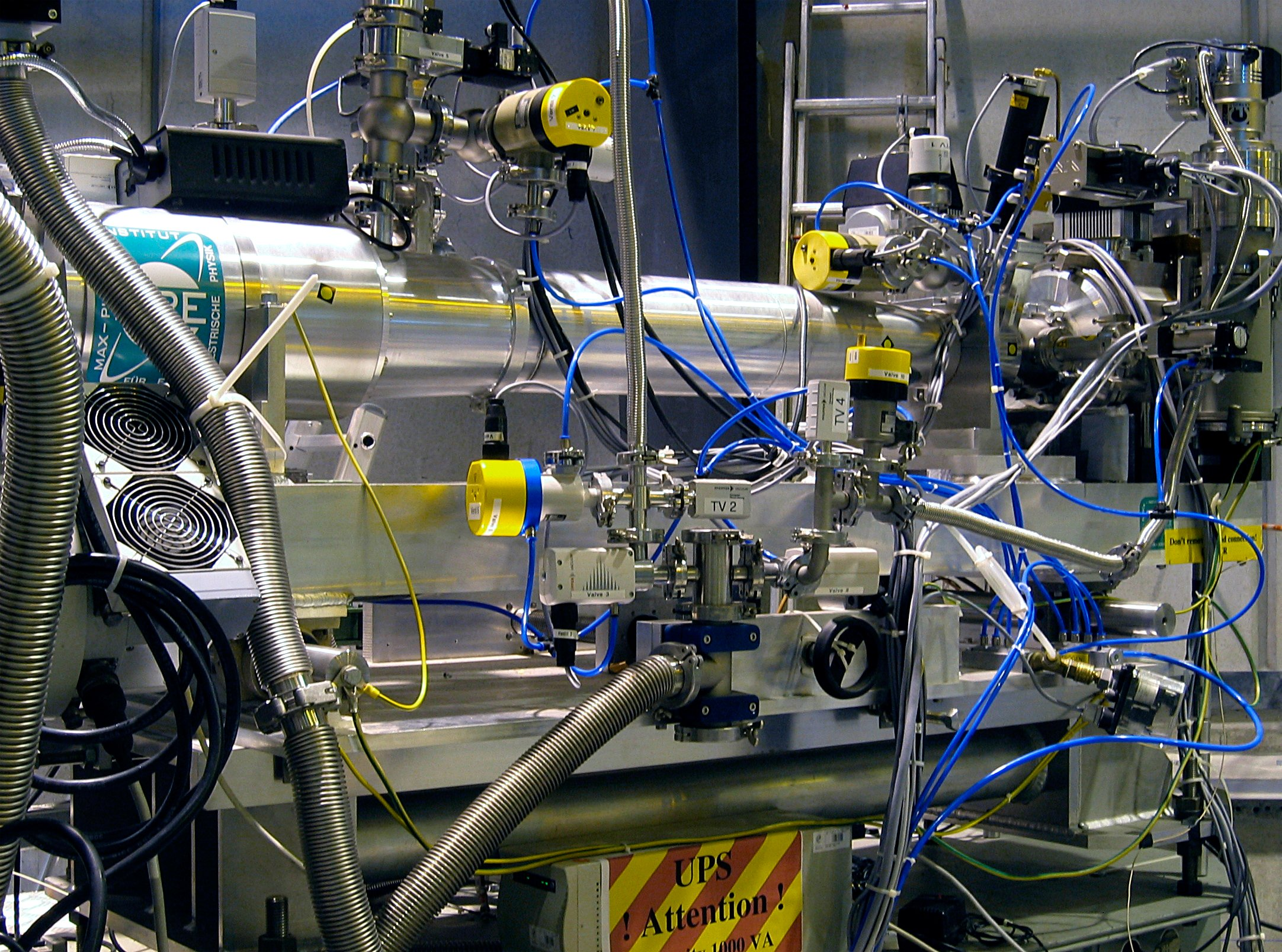 Seitenansicht des Röntgenteleskop des CAST Experiments am CERN.